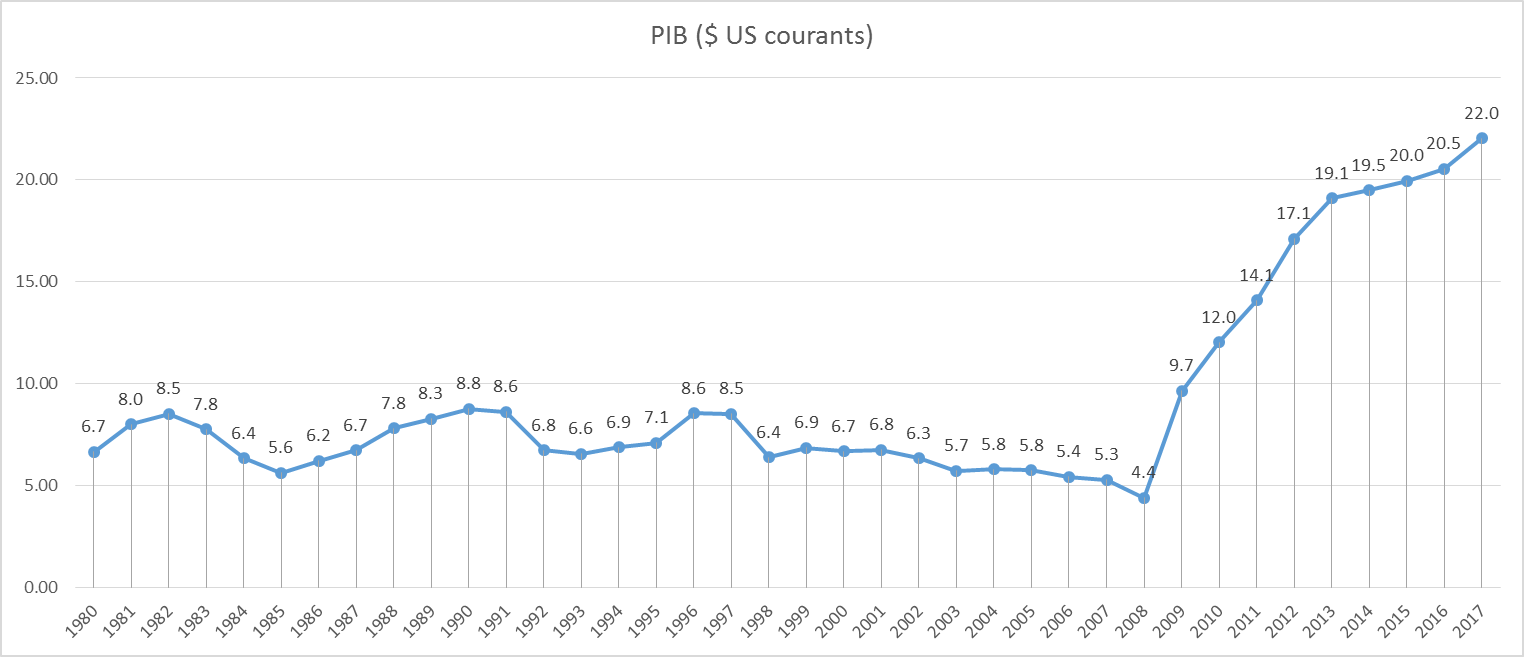 PIB du Zimbabwe, 1980-2017 d'après données banque mondiale